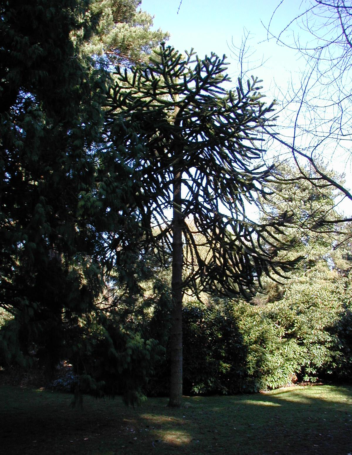 Araucaria araucana: Habit.